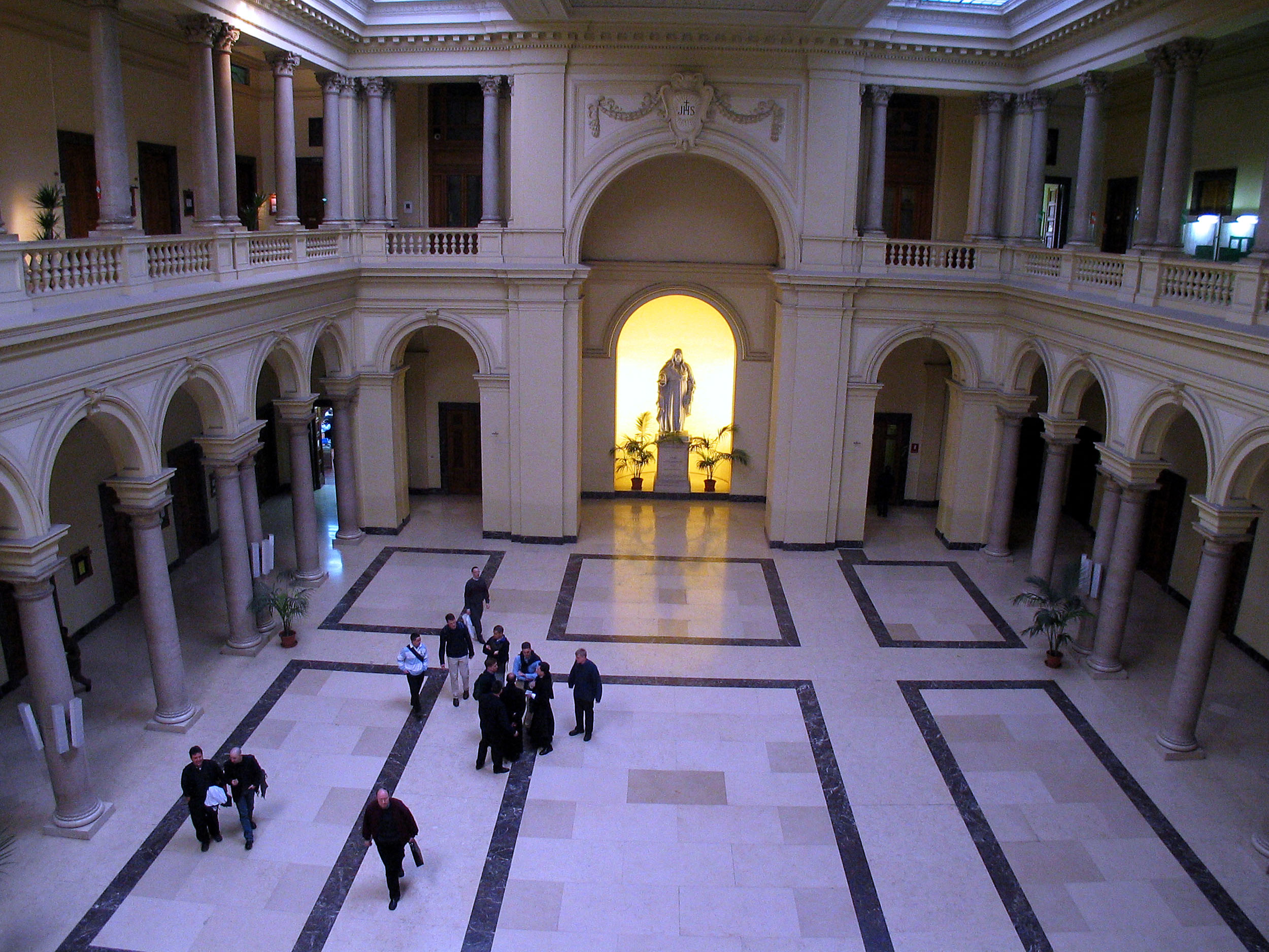 Pontificia Università Gregoriana (Roma) - Interno